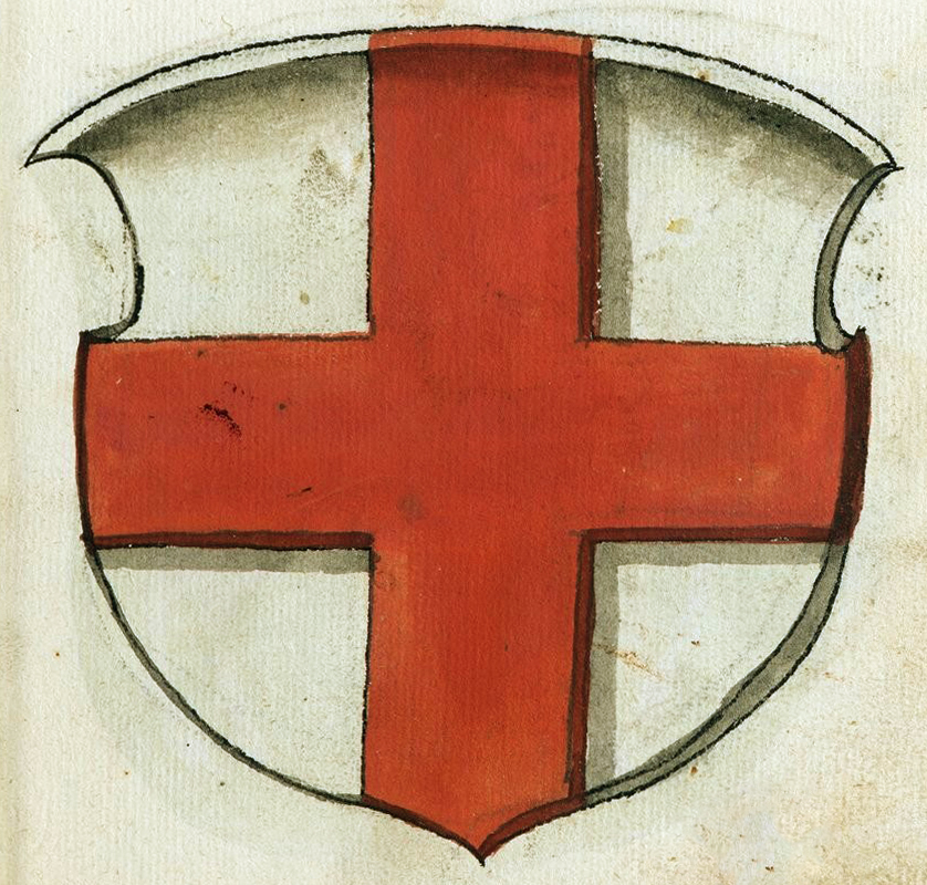 Беларуская (тарашкевіца): Меркаваны зямельны герб Наваградчыны (Navahradak) і Брацлаўшчыны